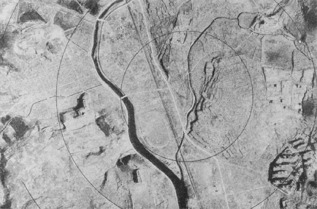 Ground Zero at Nagasaki - after bombing.